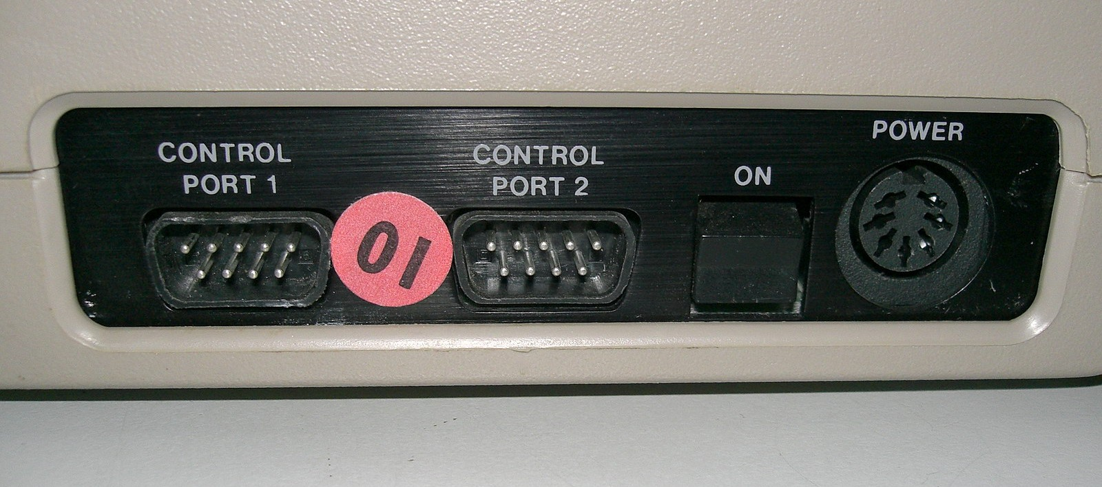 Commodore 64 - Joystick-Schnittstellen, Ein- Aus-Schalter, Netzanschluss